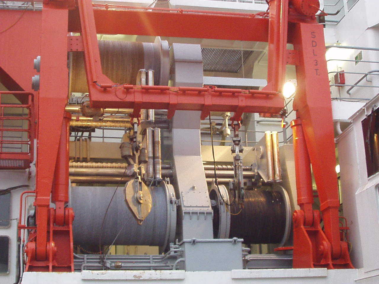 Forschungsschiff Meteor - Winschen an Bord